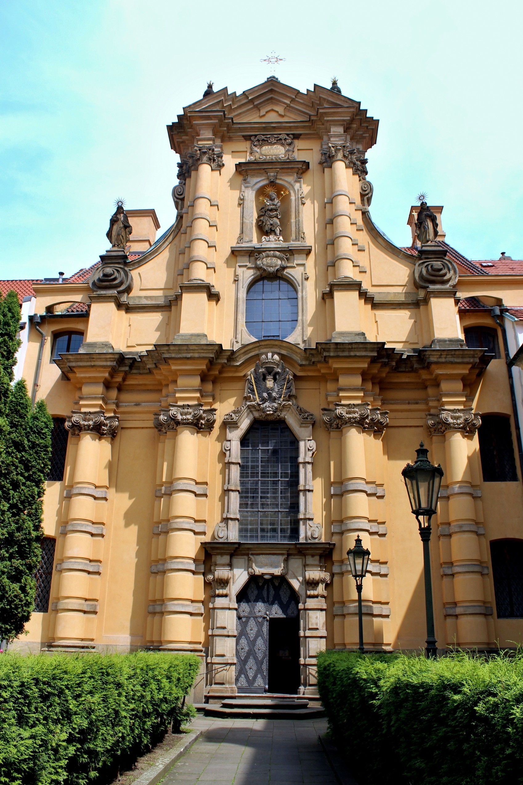 Praha 1-Malá Strana, kostel sv. Josefa